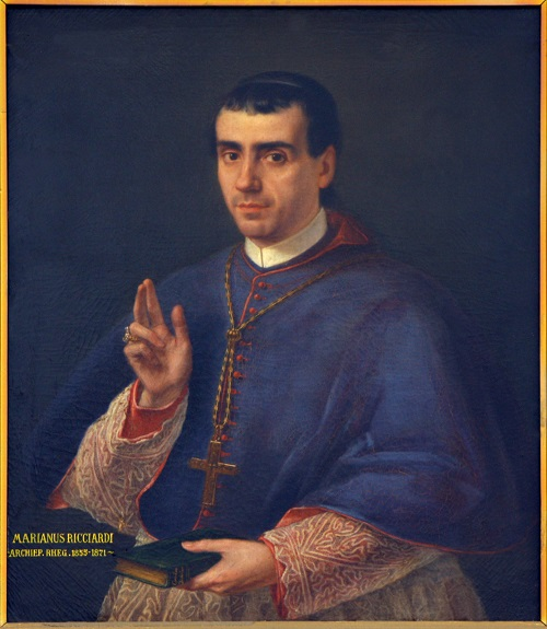 Scuola meridionale, secondo quarto sec.XIX, Arcivescovo Mariano Ricciardi, Cattedrale di Reggio Calabria, Aula Capitolare